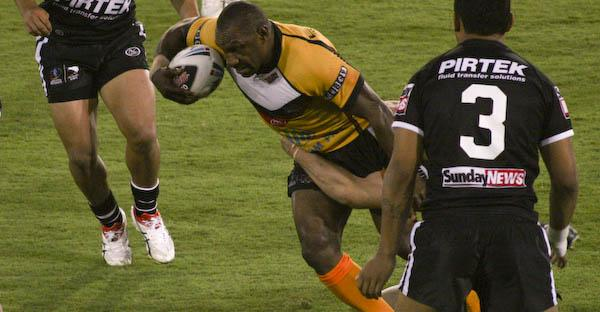 PNG Hit Up